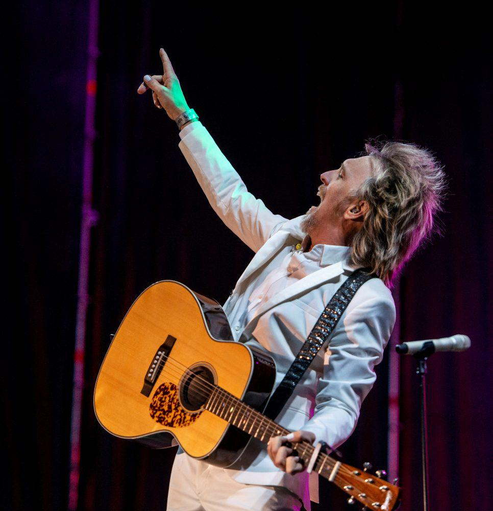 Ayer, lunes 14 de mayo, la Plaza Mayor celebró los 25 años de M80 con un concierto que recogió buena parte de la escena del rock nacional más popular. En Las Visitillas tomaban el relevo los sonidos más alternativos, mientras que el parque de Tierno Galván se iluminó a la luz de los fuegos artificiales en honor del ‘viejo profesor’. Una tarde-noche llena de música y color para unas fiestas que congregan cada día a miles de personas.